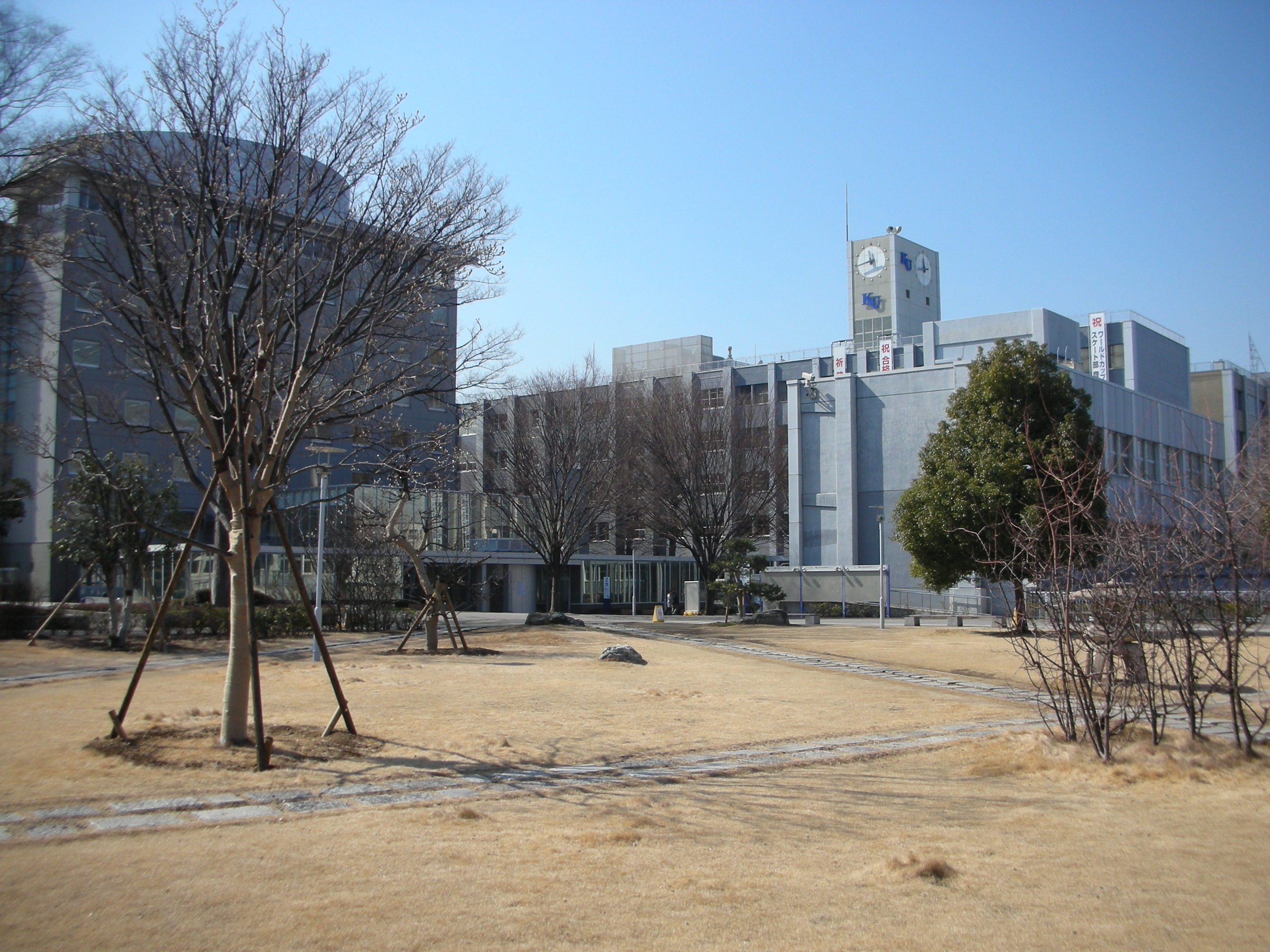 神奈川大学横浜キャンパスの外観。